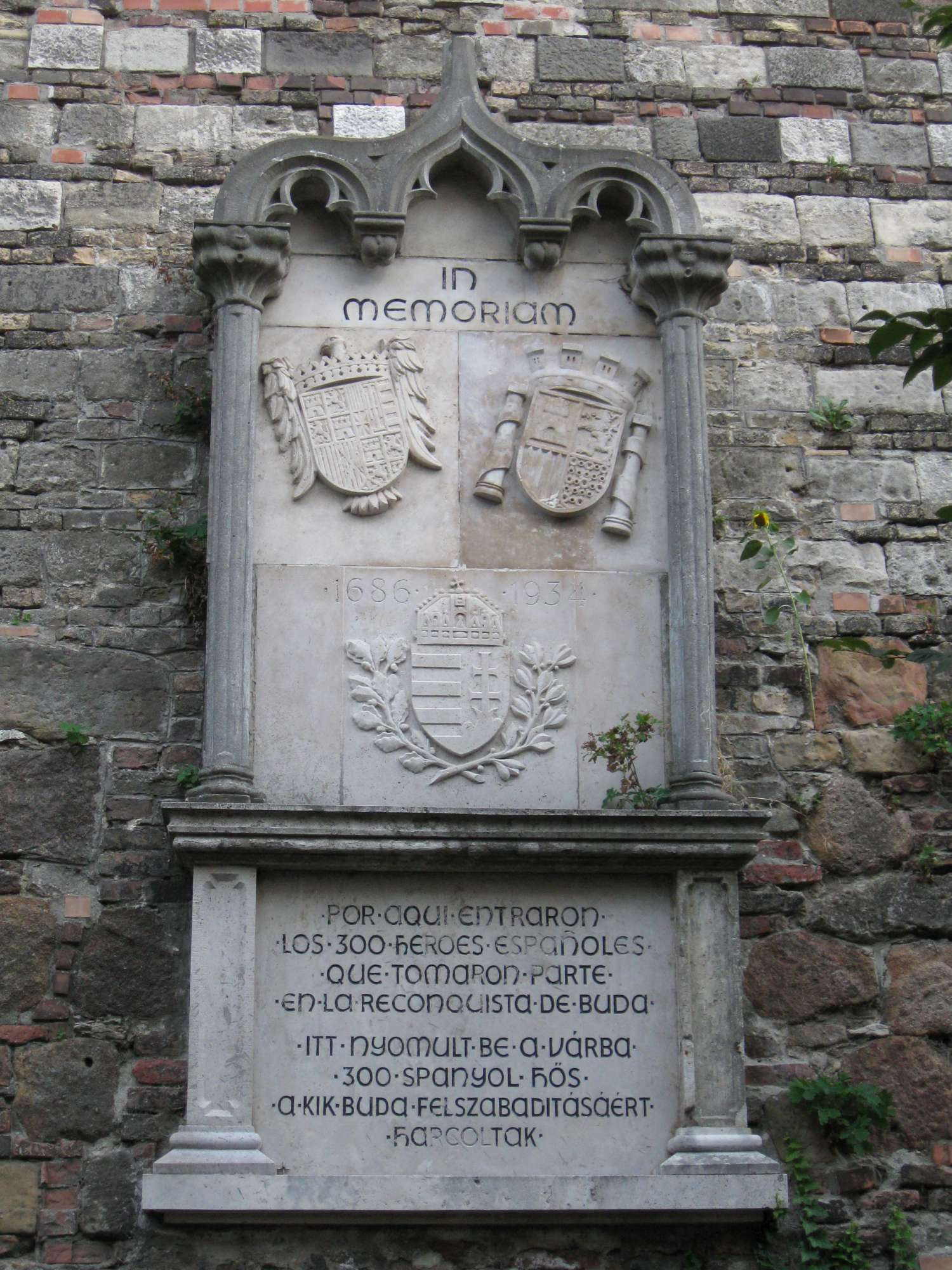 Budavár 1686-os visszafoglalásának egyik emléktáblája, a spanyol katonák emlékére. Spanyol hősök emléktáblája (dr. Farkas Zoltán (1900–1945), 1934). - Budapest, I. ker. Anjou-bástya / Lovas út.